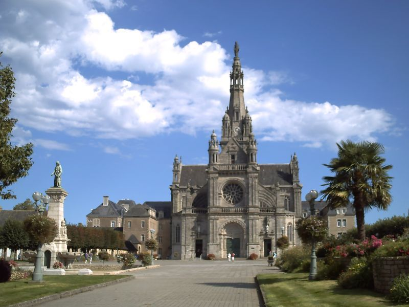 Vue générale This building is en partie classé, en partie inscrit au titre des Monuments Historiques. .